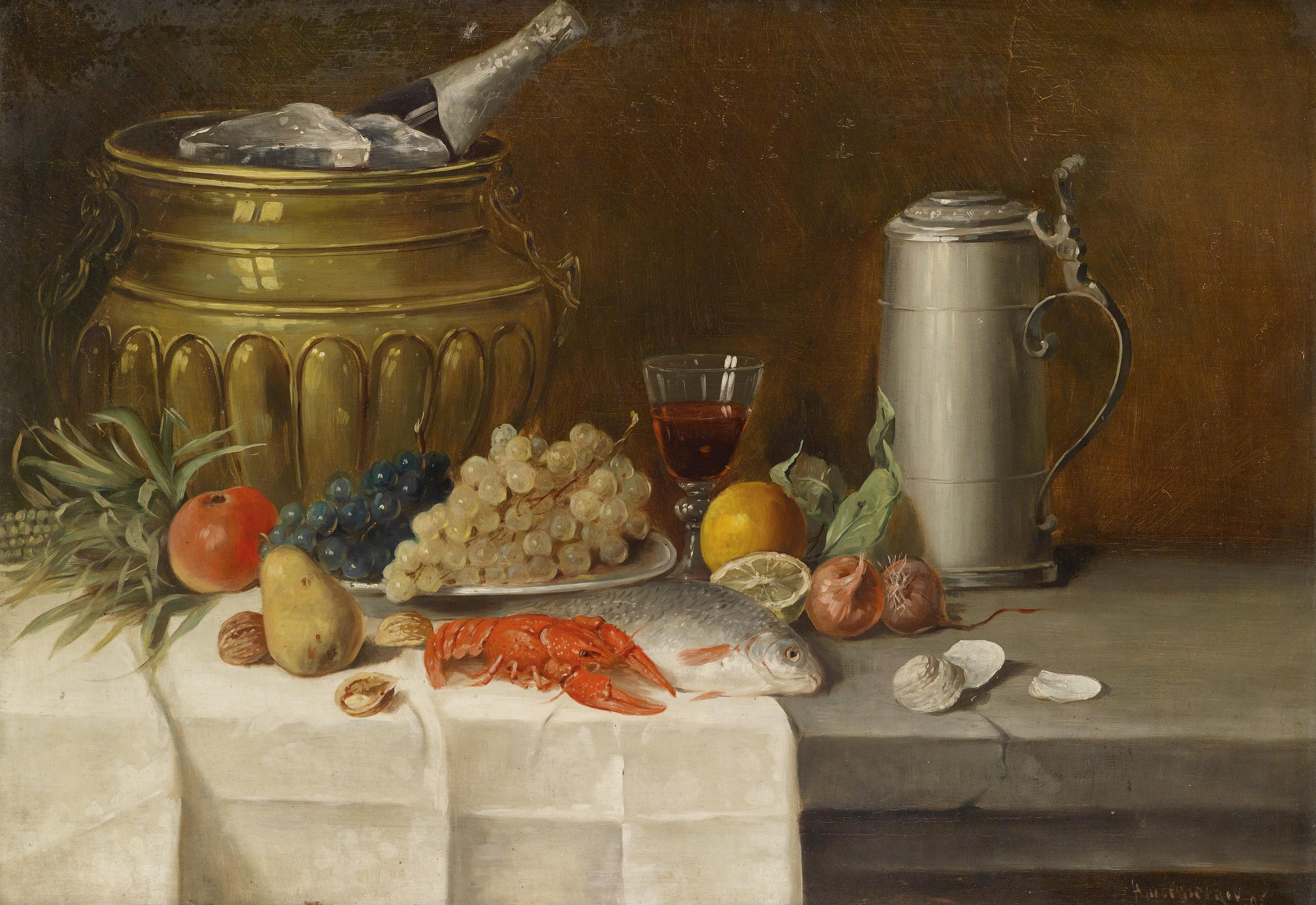 Stillleben mit Bierhumpenlabel QS:Lde,"Stillleben mit Bierhumpen"